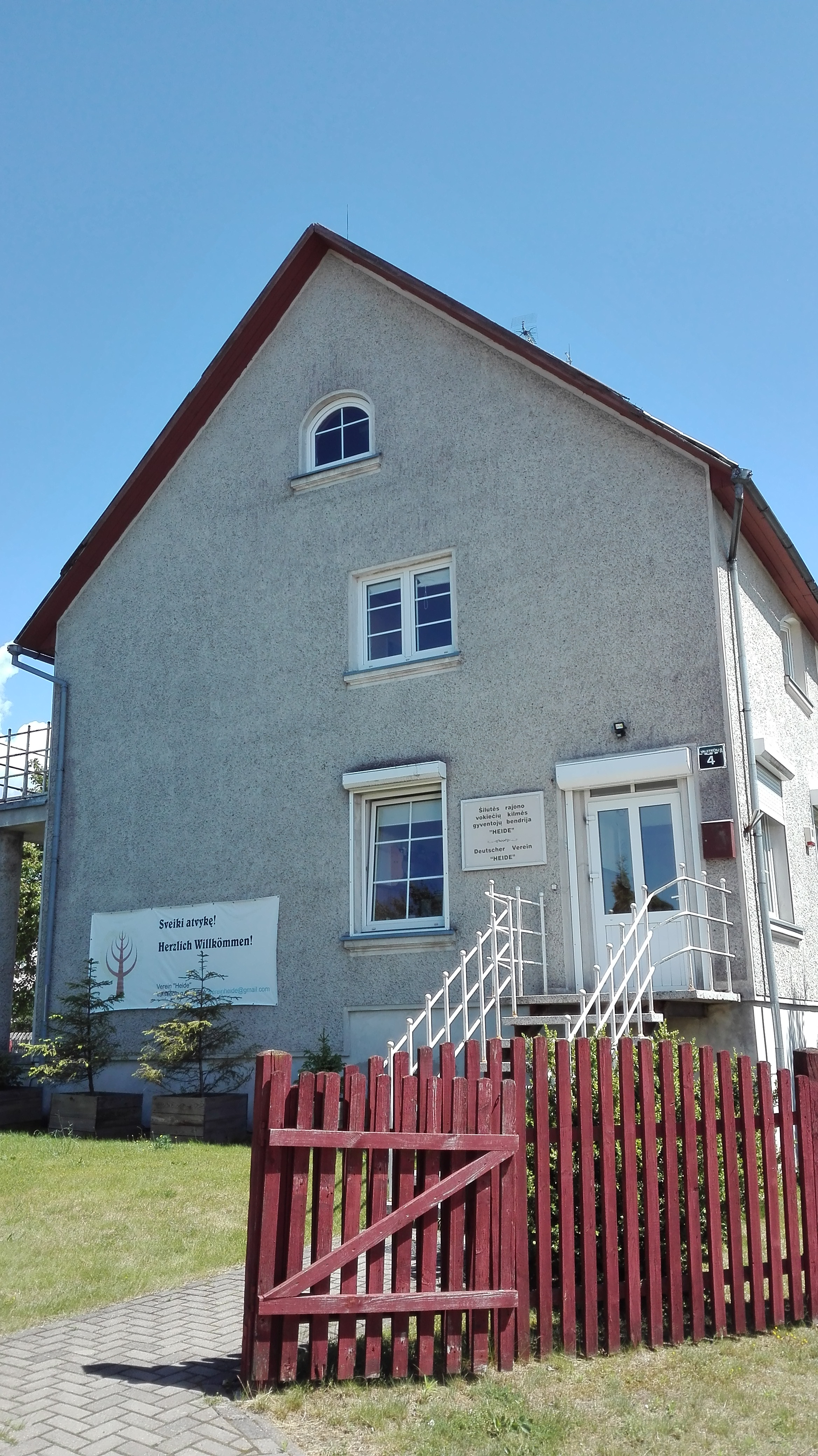 Vokiečių kilmės gyventojų draugija Šilutėje